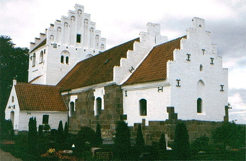 Ellinge Kirke i Danmark. Ellinge kirke